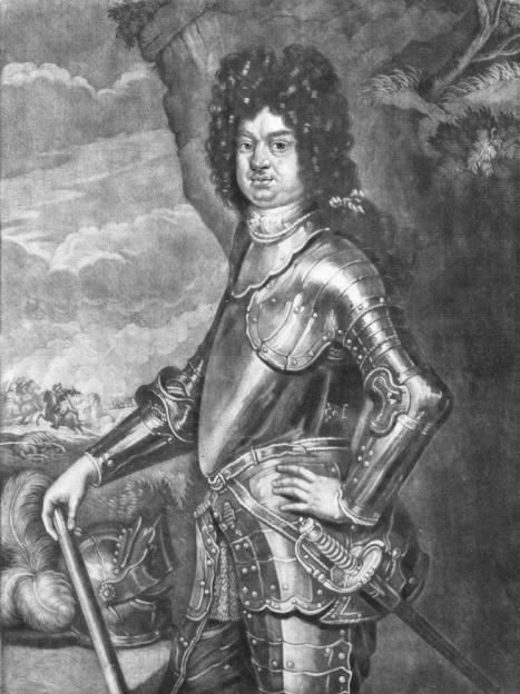 Heinrich, Herzog von Sachsen-Weißenfels-Barby (1650-1710), wrongly named "von S.-Römhild"!!!